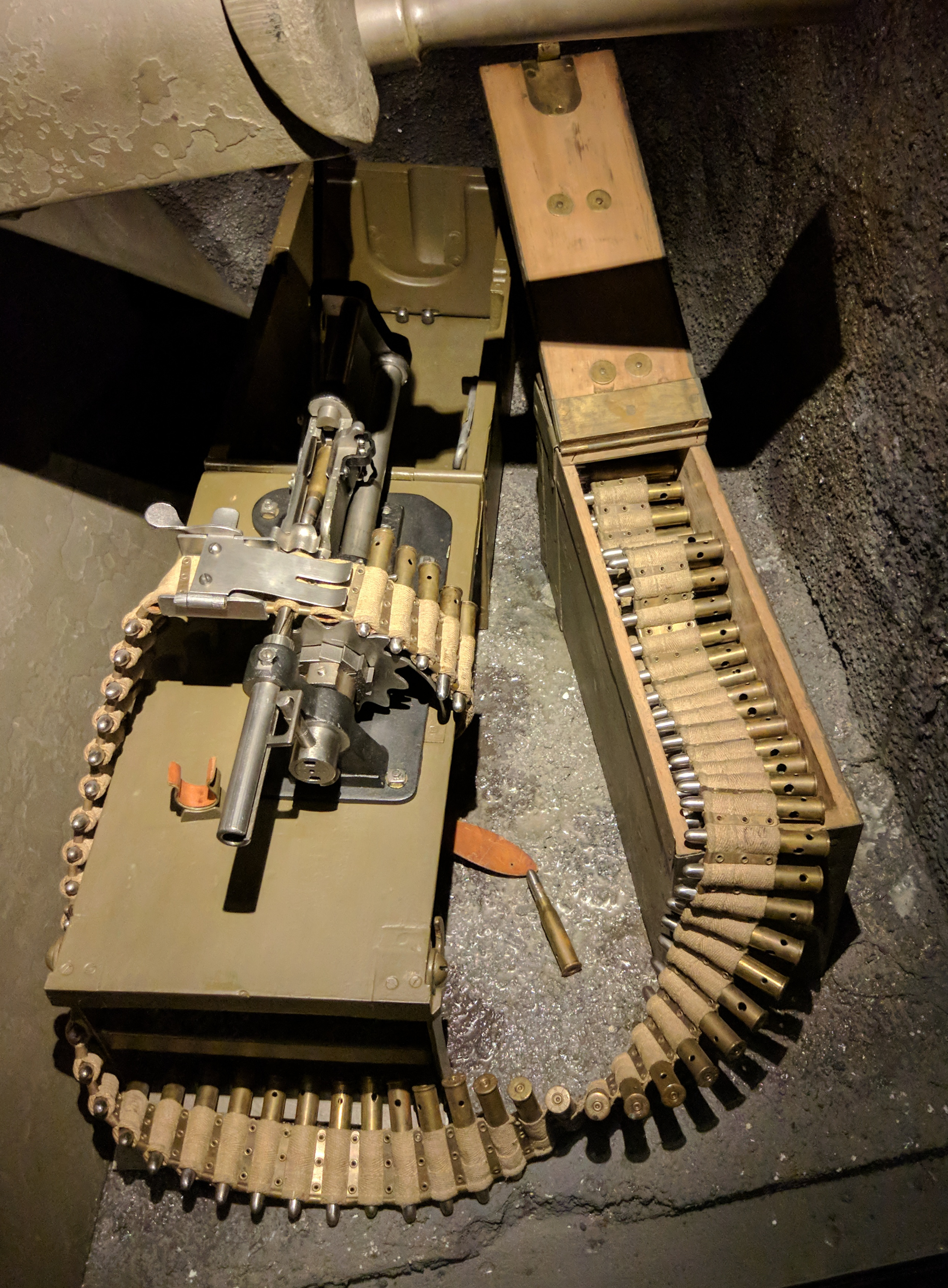 Polnilec nabojnih pasov za mitraljez Schwarzlose.